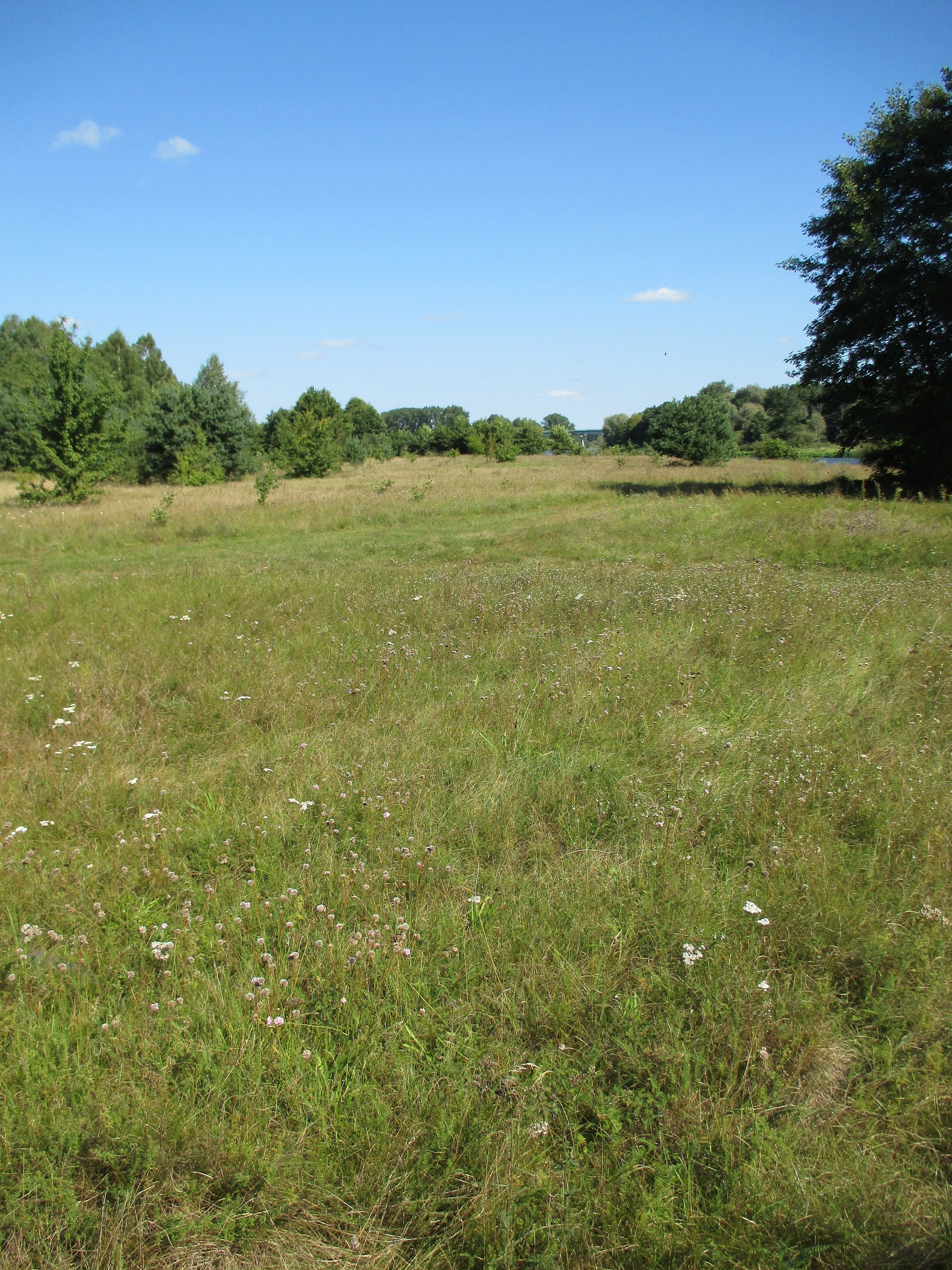 Беліца-2. Старажытная стаянка